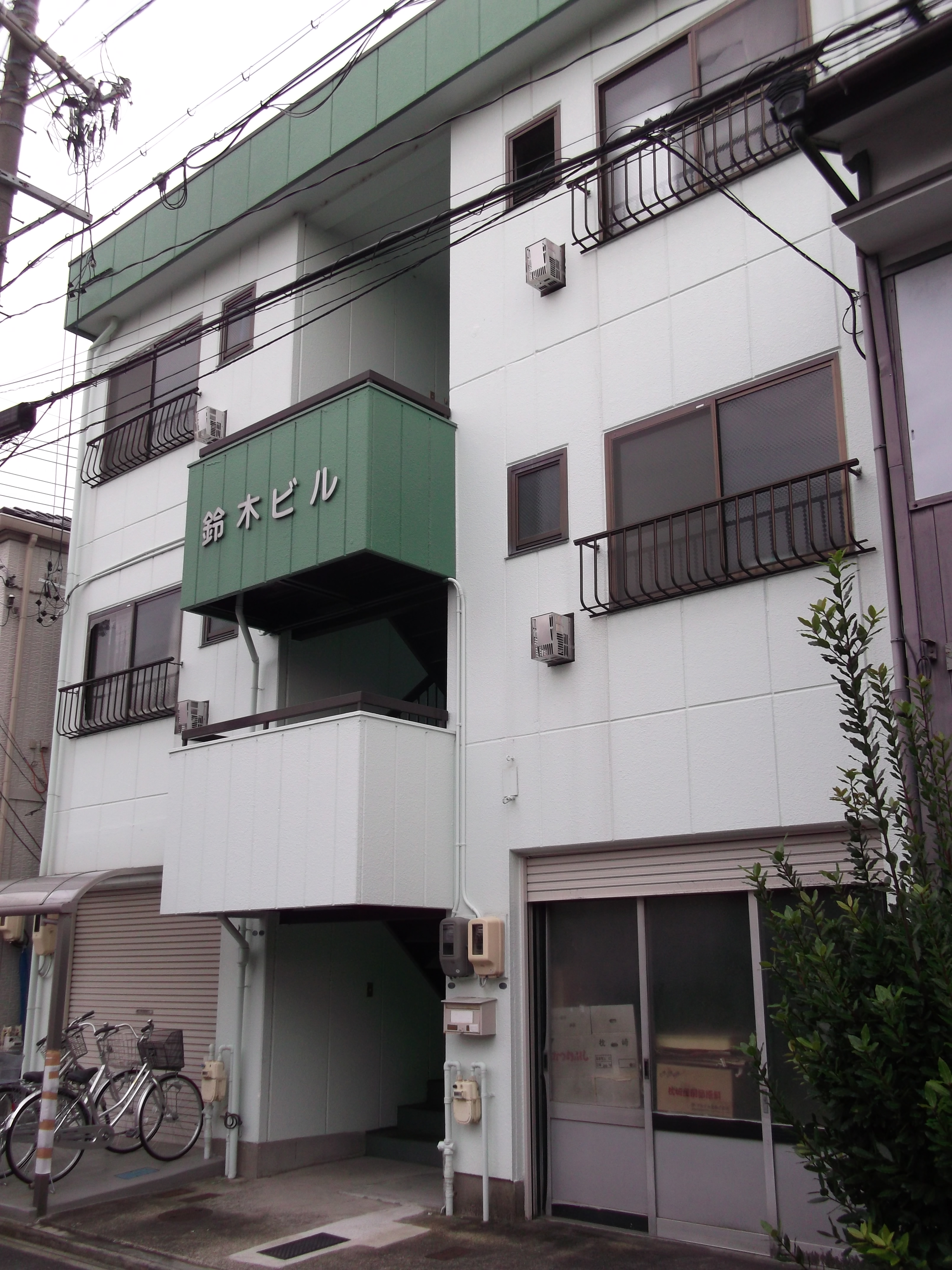 名古屋市北区金城の鈴木ビルを北西から写す